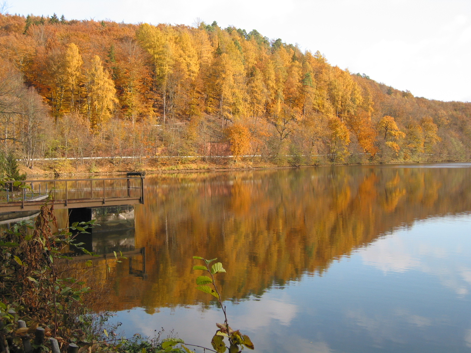 Der Wilhelmsthaler See, Nordufer im Herbst 2003